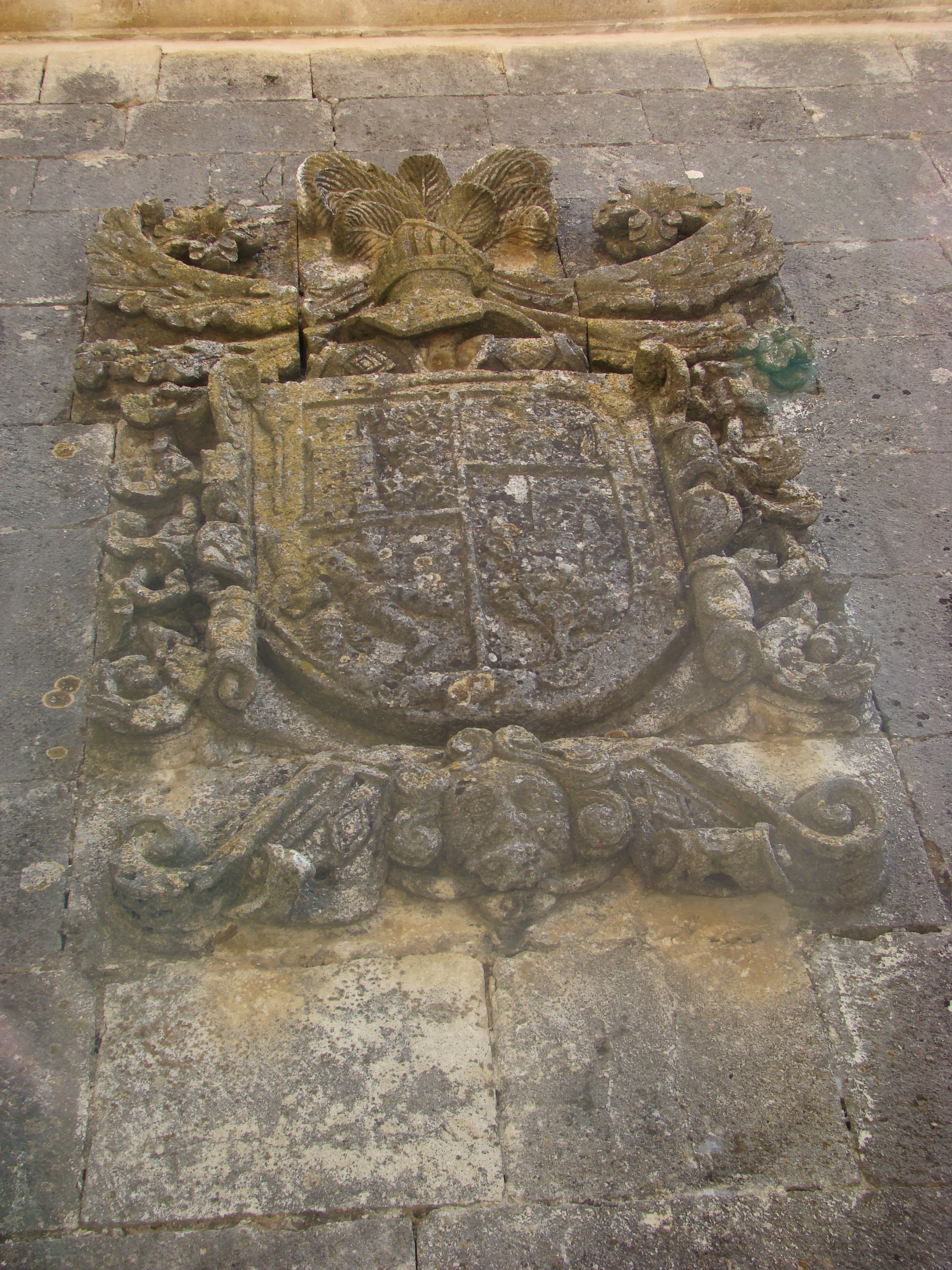 Foto del escudo en la pared de la iglesia de San Lorenzo en Hontomín (Burgos).